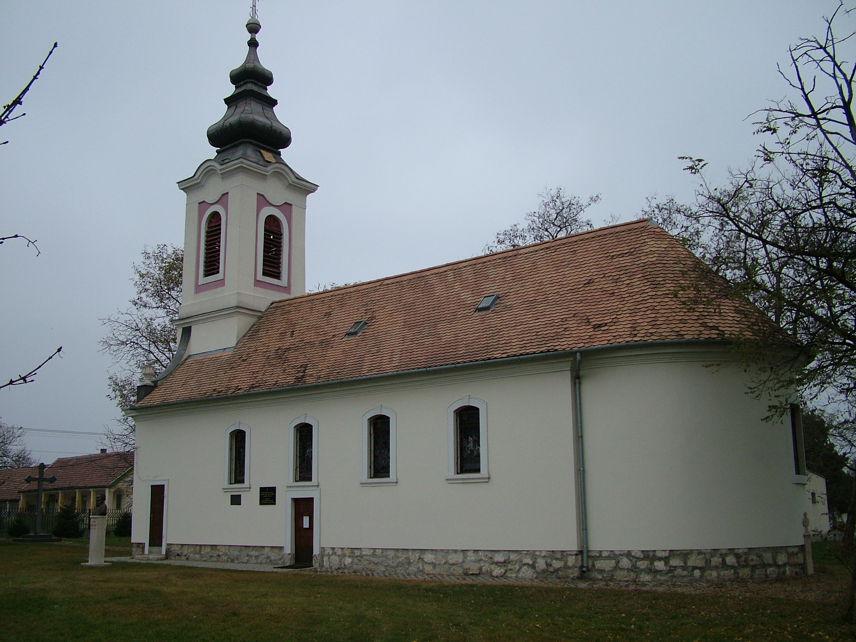 A fényképet a templomról egy állapotfelmérés dokumentálása alkalmával készítettem, több más felvétellel együtt.